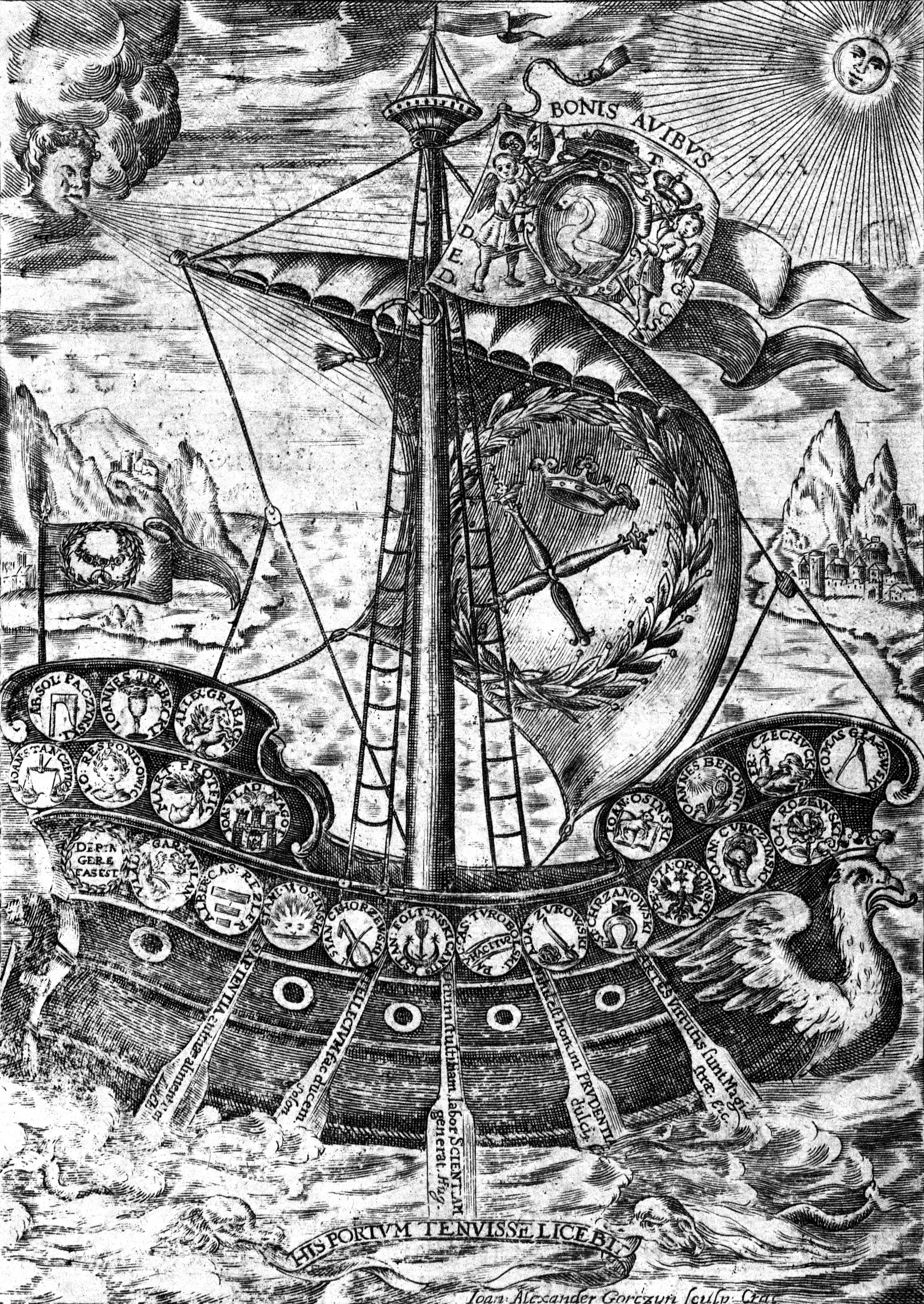 frontyspis książki Argo sarmatica quam sub auspiciis [...] Andreae Trzebicki [...] cum XXII viris secundae laureae candidatis [...] Stanislaus Iurkowski [...] in portu novae in Orbe Arctoo Colchidis Academiae Cracoviensis constituit, Cracoviae 1664, rycina Jana Aleksandra Gorczyna